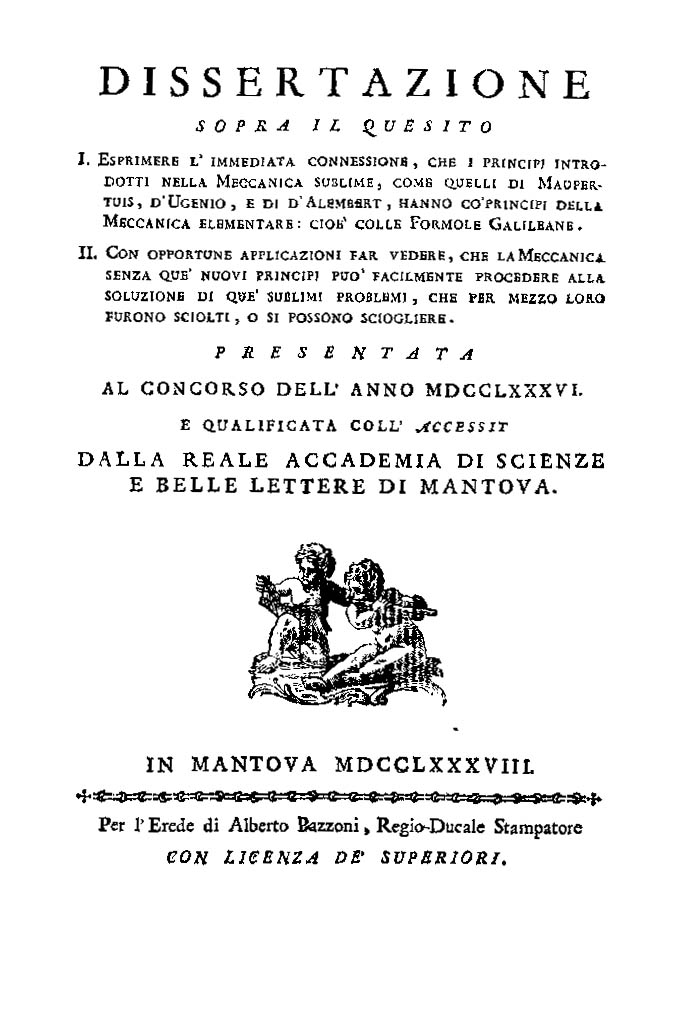 Dissertazione sopra il quesito 1. Esprimere l'immediata connessione, che i principi introdotti nella meccanica sublime, come quelli di Maupertuis, d'Ugenio, e di D'Alembert, hanno co' principi della meccanica elementare: cioè colle formole galileane. 2. Con opportune applicazioni far vedere, che la meccanica senza que' nuovi principi può facilmente procedere alla soluzione di que' sublimi problemi, che per mezzo loro furono sciolti, o si possono sciogliere. Presentata al concorso dell'anno 1786. E qualificata coll'accessit dalla reale Accademia di Scienze e Belle lettere di Mantova. - In Mantova : Per l'erede di Alberto Pazzoni, regio ducale stampatore, 1788. - 62, [2] p., [2] c. di tav. ripiegate ; 4º. - Il nome dell'Autore si deduce da carta A2r .